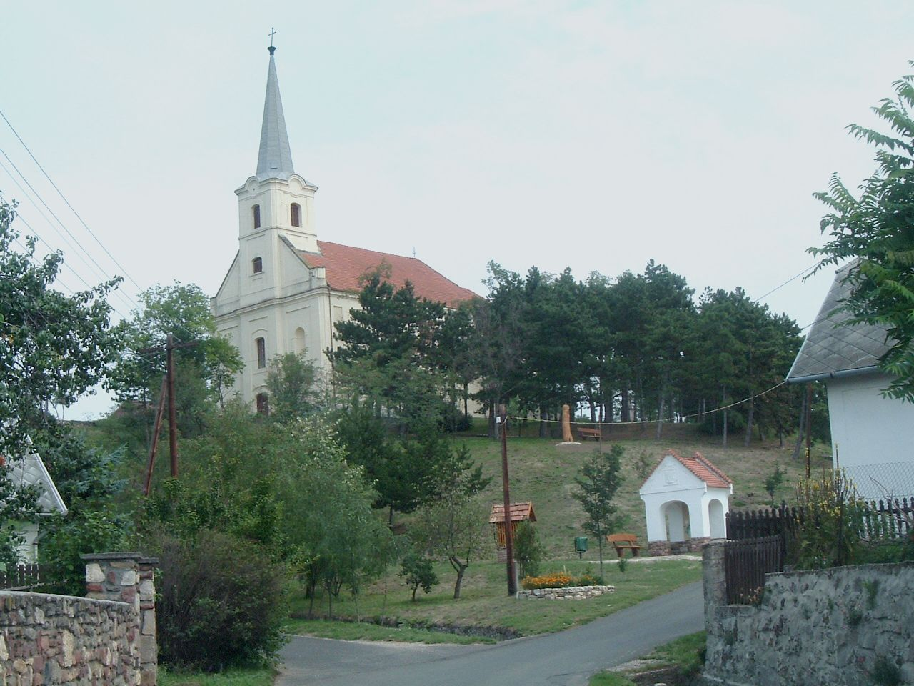 Szentbékkálla, Gyümölcsoltó Boldogasszony római katolikus templom